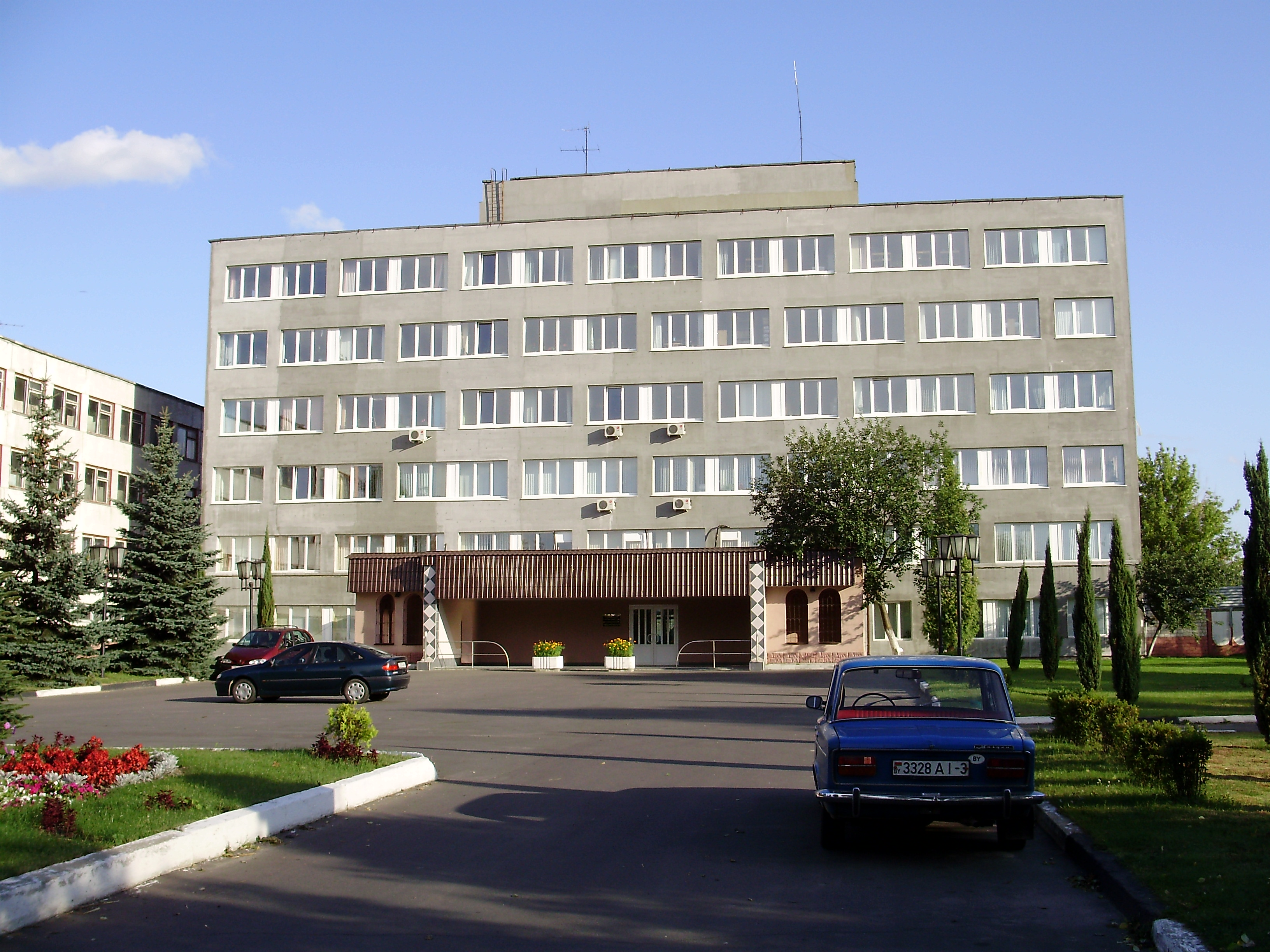 Беларуская (тарашкевіца): Адміністратыўны корпус завода "ЗЛіН" на вул. Магілёўскай у г. Гомеле